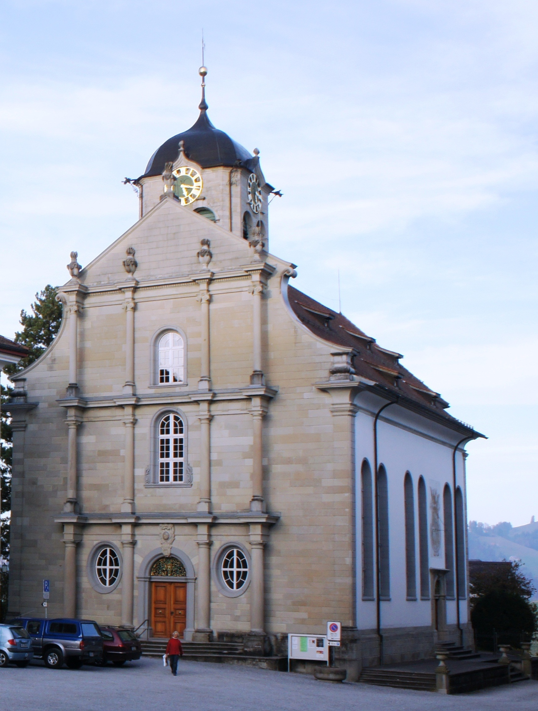 Blick aus Südwesten auf die reformierte Kirche auf dem Landsgemeindeplatz in Trogen.